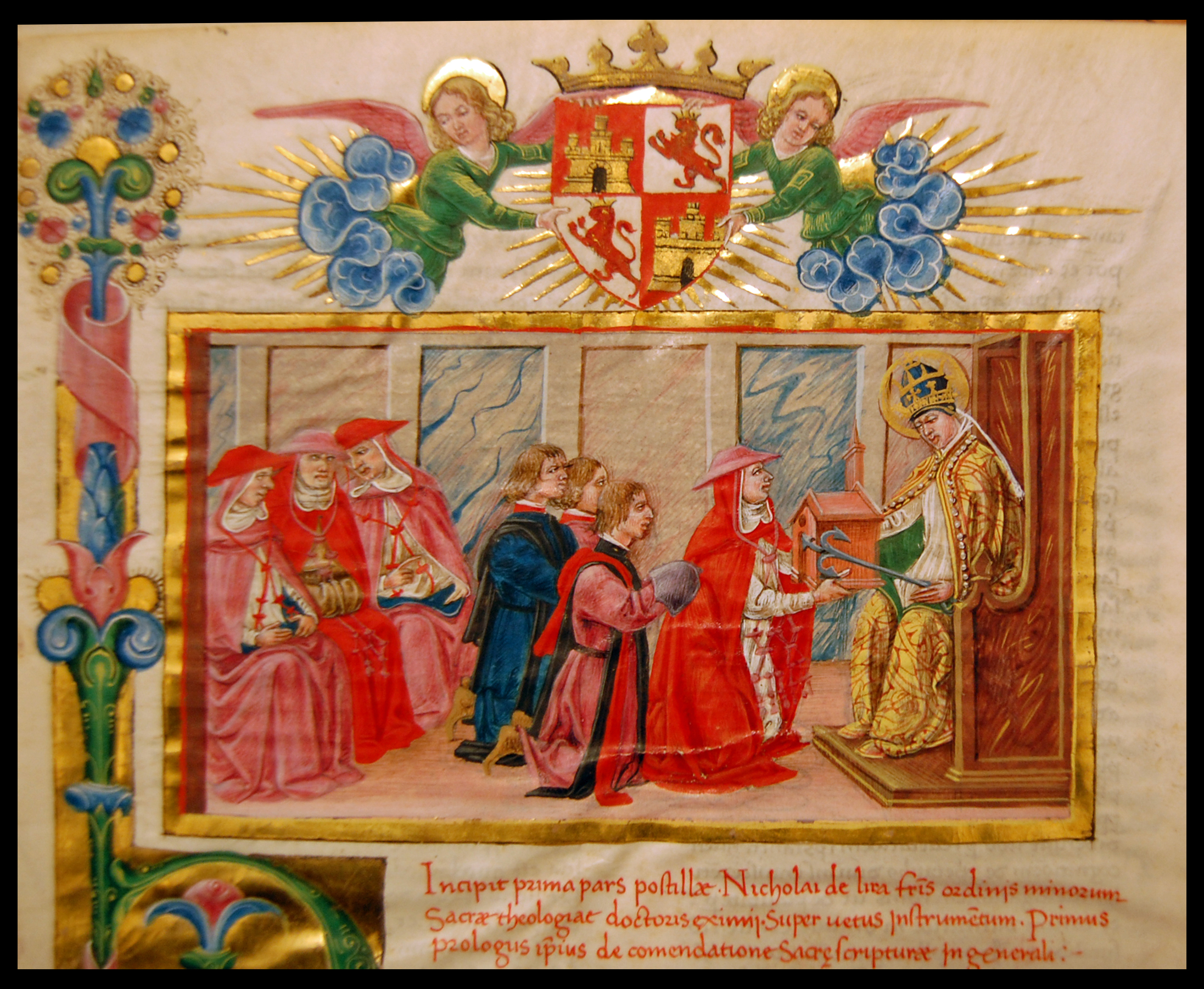 Gil de Albornoz entregando simbólicamente al Papa San Clemente I la capilla del Colegio de España en Bolonia, dedicada a dicho santo (reconocible en la miniatura por sus vestimentas papales, el nimbo de santidad y el áncora con que fue martirizado). Miniatura del códice nº 30 (Postilla in libros historicos Veteris Testamenti, Genesis-Liber II Esdrae), fol. 001r, Biblioteca del Real Colegio de España en Bolonia (Italia). Año de realización del libro: 1475.